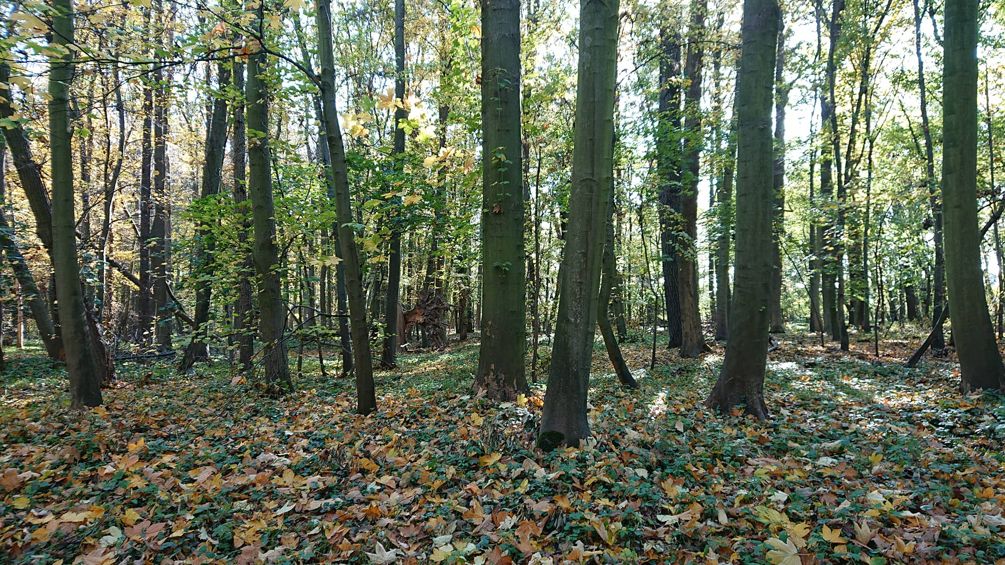 fotka přírodní památky Jiřina - lužní les